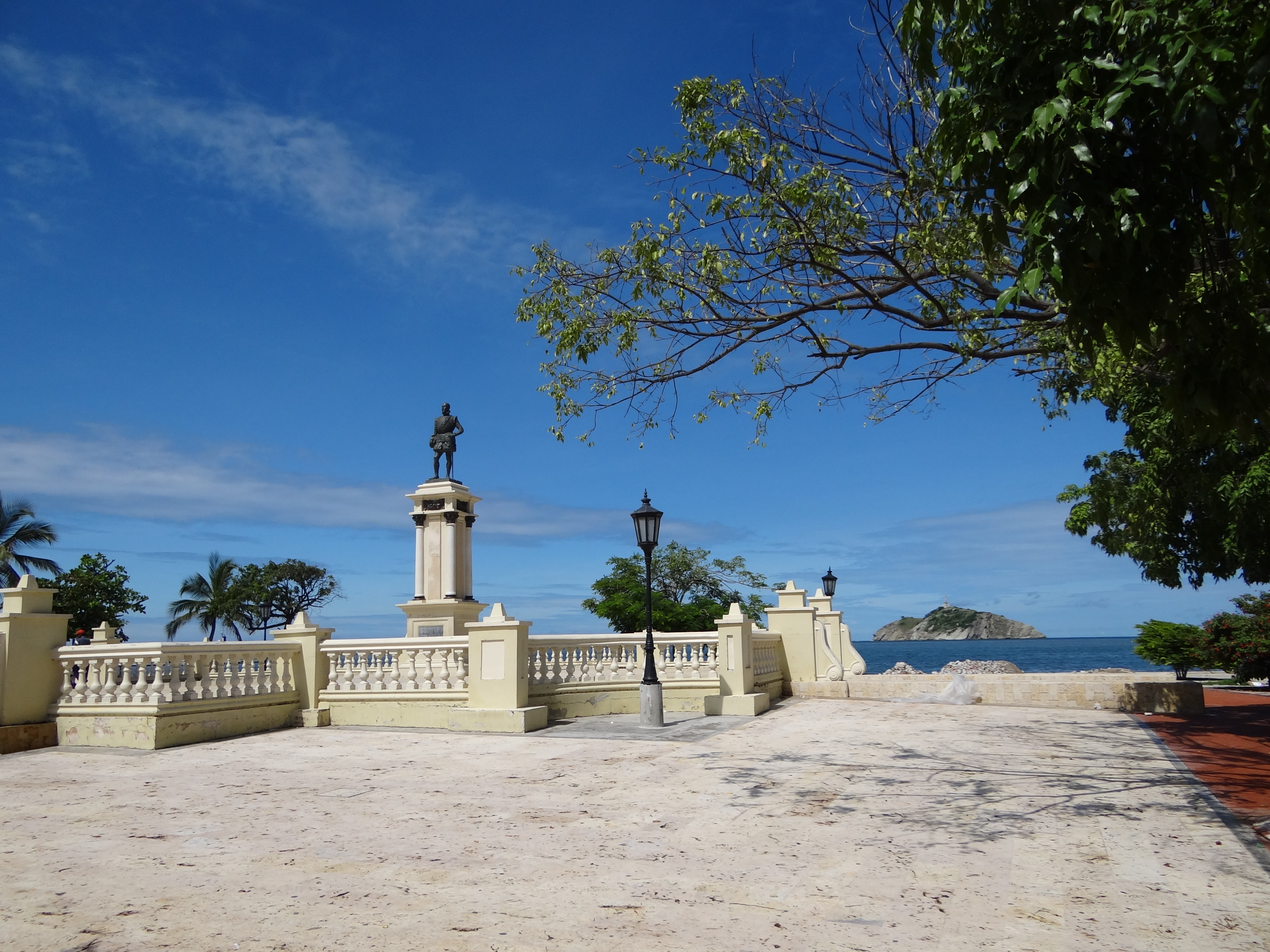 Monumento a Rodrigo de Bastidas. Sector Antiguo de la ciudad de Santa Marta, Colombia.